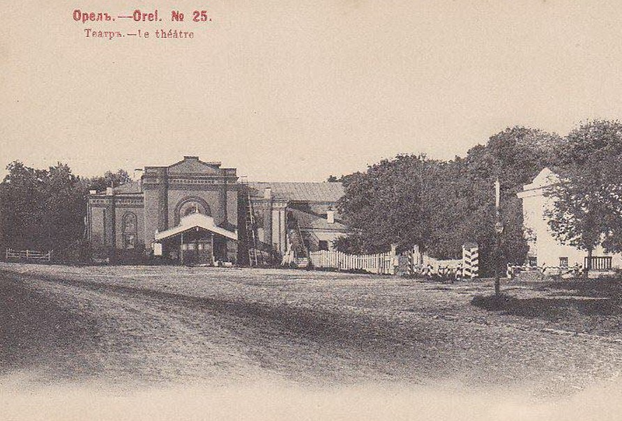 Театральная площадь. Городской театр у входа в Городской сад.